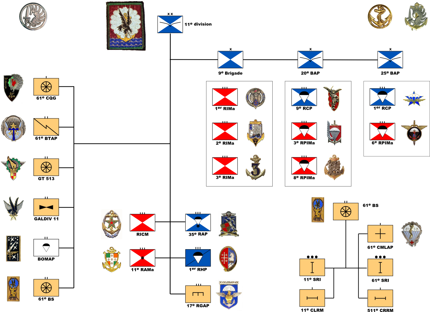 Organigramme de la 11e division en juillet 1966, d'après histoire des parachutistes français page 559